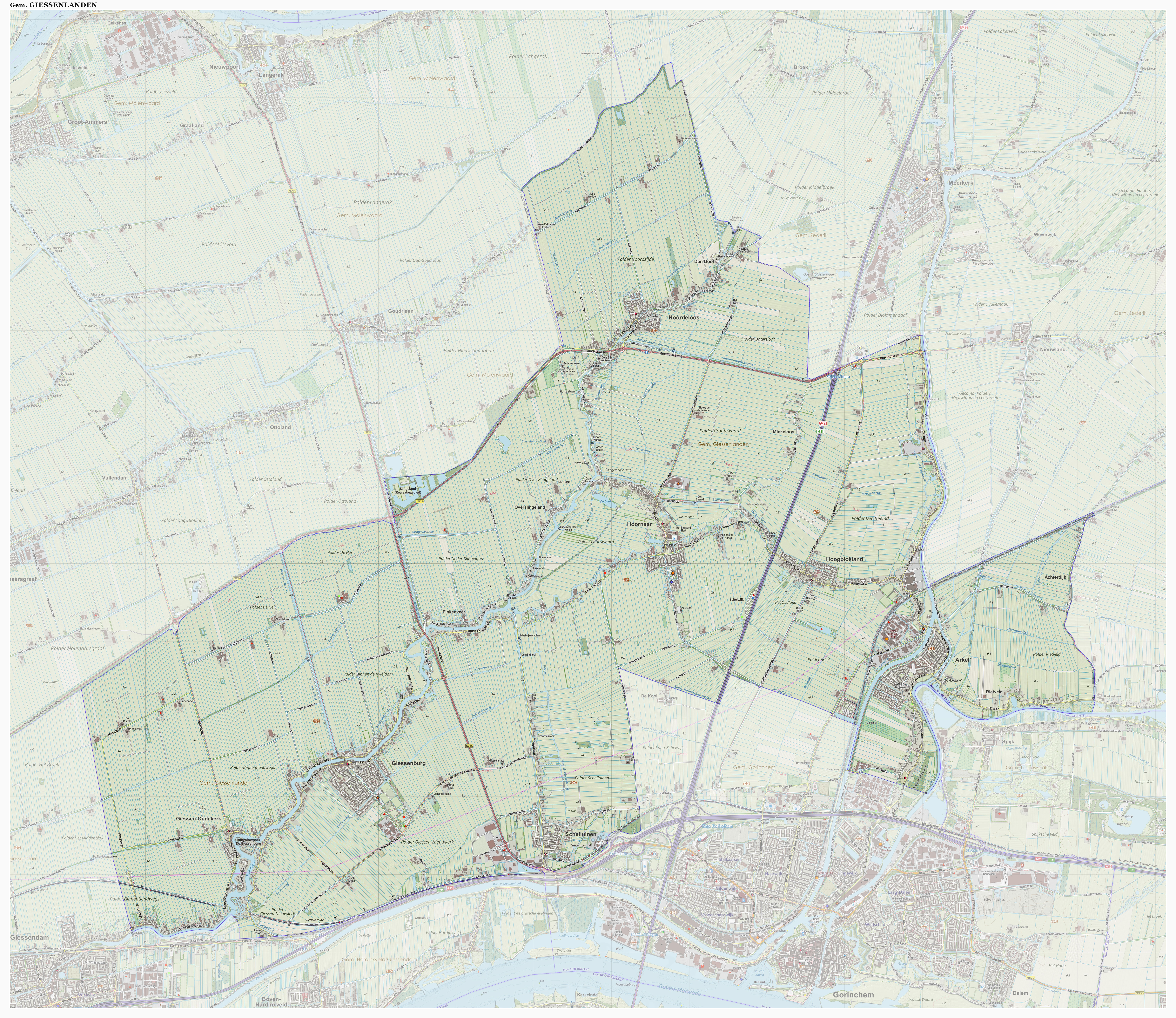 Topografische gemeentekaart. Resolutie: 400 pixels/km. Kaartbeeld samengesteld uit de open geodata van de Top10NL en Top25namen (Kadaster), Creative Commons-BY licentie. Gebouwvlakken uit open geodata BAG extract. Wegen uit de OpenStreetMap, OpenStreetMap community. Reliëfschaduw uit de Actuele Hoogtekaart AHN2. Samenstelling en kleurenschema: Jan-Willem van Aalst, met QGIS. Zie ook de Legenda.